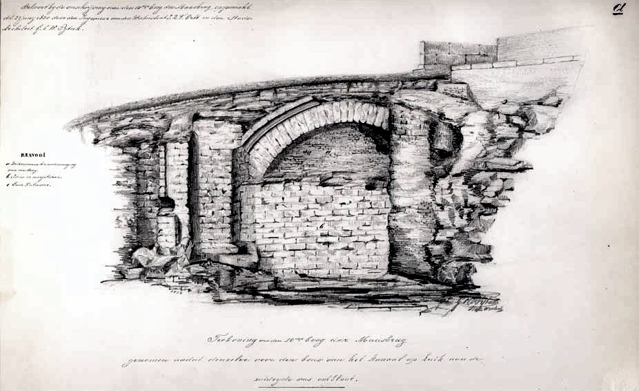 Potloodtekening van de zogenaamde 'Tiende Boog' van de Sint-Servaasbrug in Maastricht. De boog werd ontdekt bij het graven van het Kanaal Luik-Maastricht in 1850, en daarna opnieuw begraven. In 2007 door architect Jo Coenen deels gerestaureerd, deels gereconstrueerd. Handgeschreven tekst: "Teekening van den 10den boog der Maasbrug genomen nadat denzelve voor den bouw van het kanaal op Luik aan de zuidzijde was ontbloot". Linksboven: "Behoort by de omschrijving van de 10den boog der Maasbrug. opgemaakt dd 22 juny 1850 door den Ingenleur van den Waterstaat I.R.F. Ortt en den Stads-Architect G.C.W. Pytak". Daaronder: "RENVOOI a, b, c [..]". Collectie RHCL Maastricht, GAM 16.